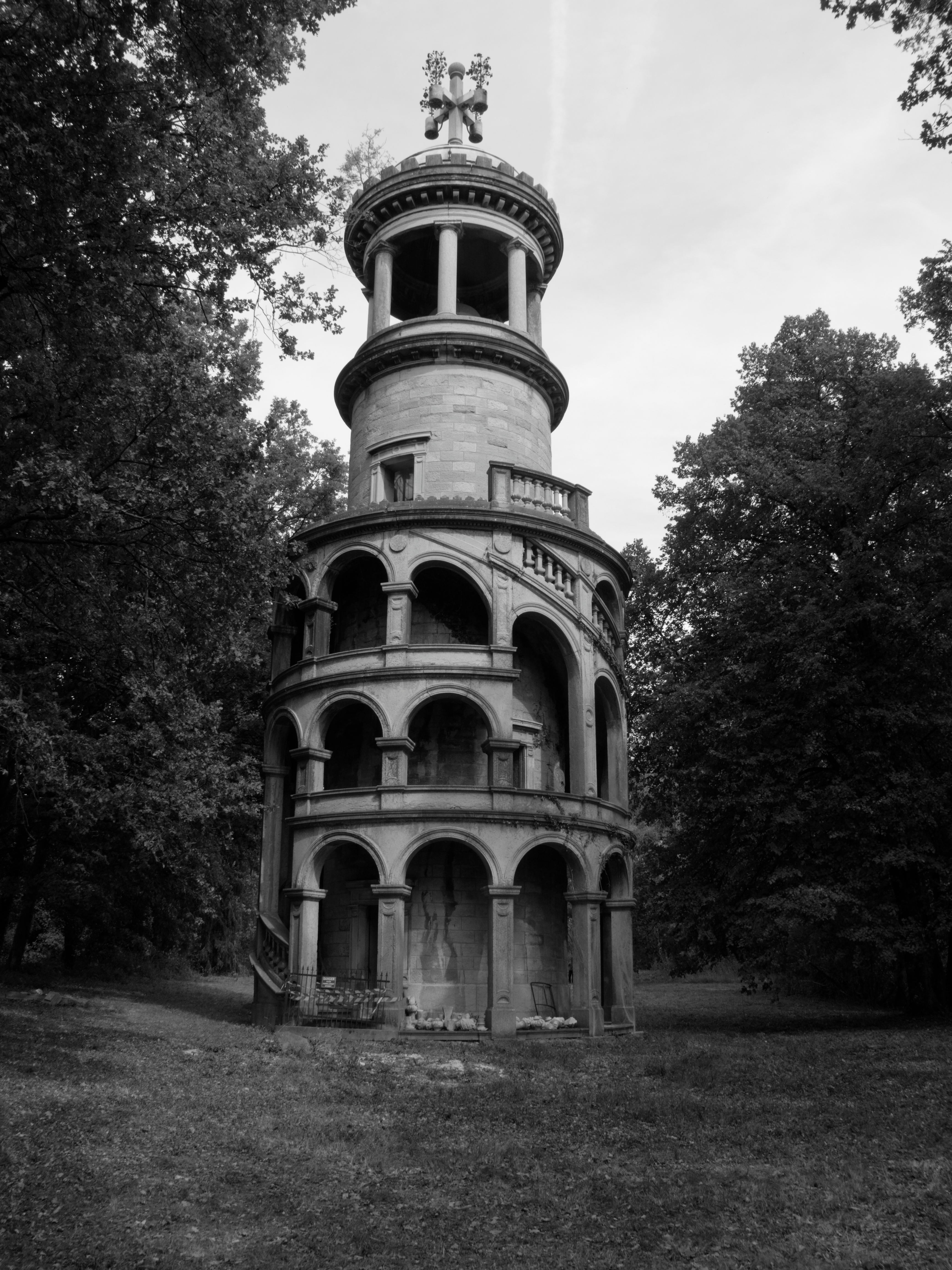 Tour des morts du chateau de Thézieu à Ruy-Montceau (Isère)